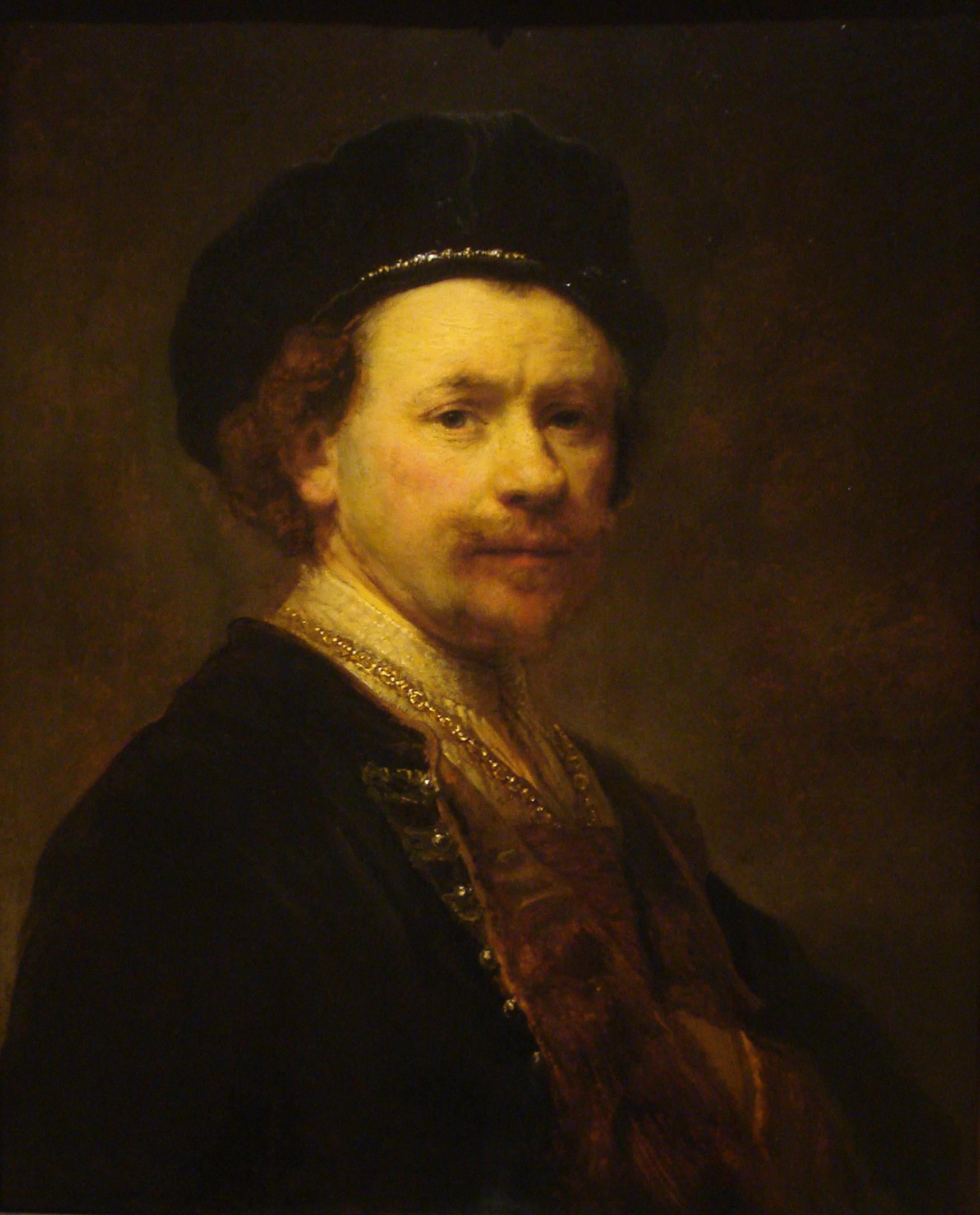 റെംബ്രാന്റിന്റെ 1936-38 കാലത്തിലുള്ളത്. പാസഡേനയിലെ നോർട്ടൺ സൈമൺ മ്യൂസിയത്തിലെ പെയിന്റിങ്ങിന്റെ ഫോട്ടോ സ്വയം എടുത്തത്